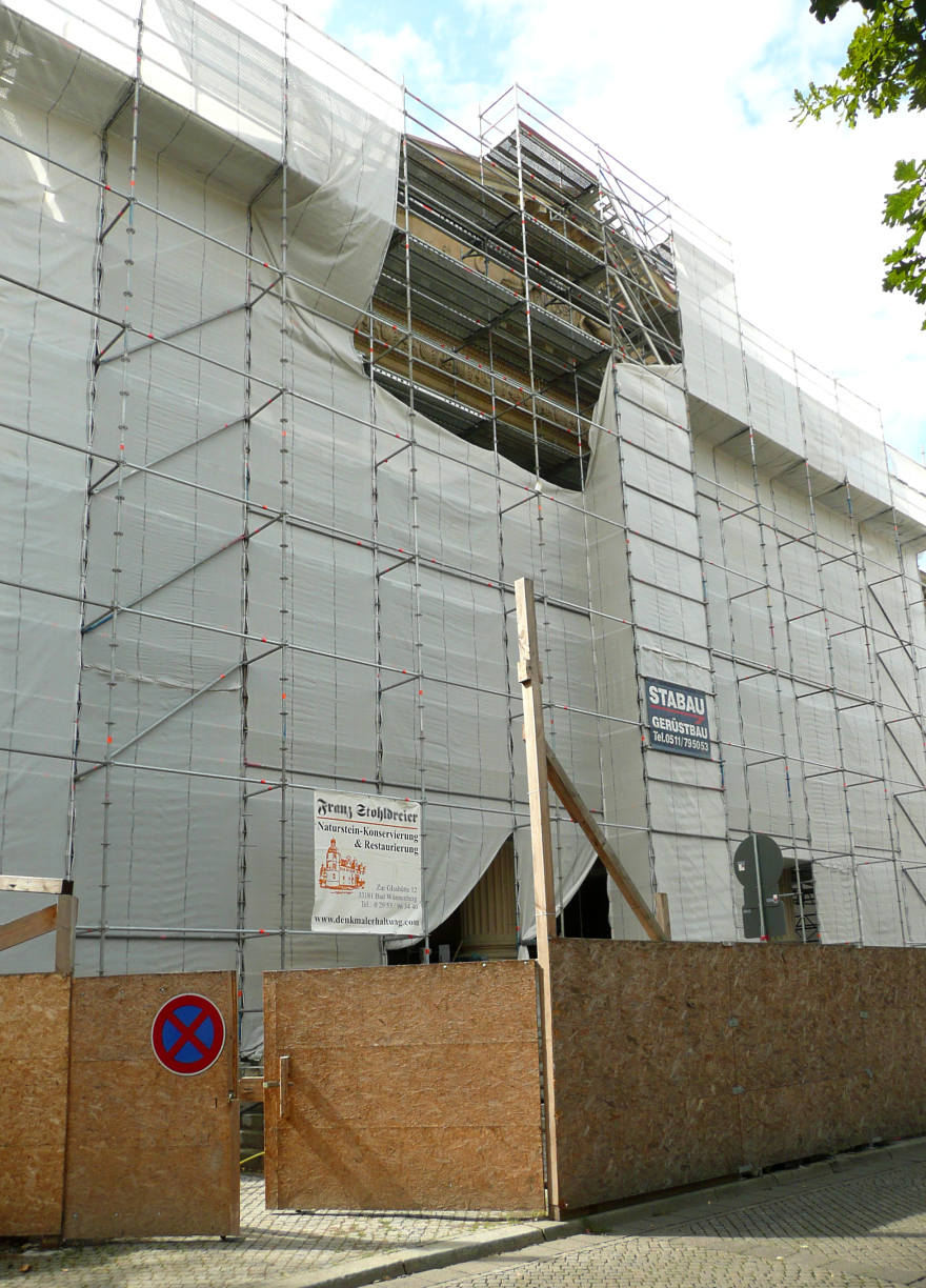 Der eingerüstete Portikus des Leineschloss während der 2014 begonnenen Umbaumaßnahmen